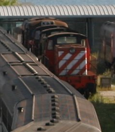 Locomotivas da Série 1200, parqueadas no depósito ferroviário do Barreiro. Portuguese locomotives of the 1200 Series, parked in the Barreiro Train Yard.